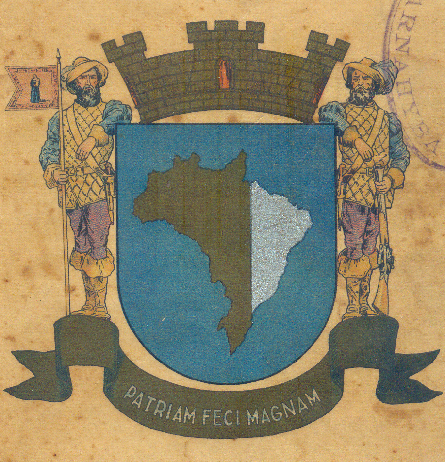 capa de do livro Polyanthéa em homengaem ao tri-centenário da creação do município de Parnahyba